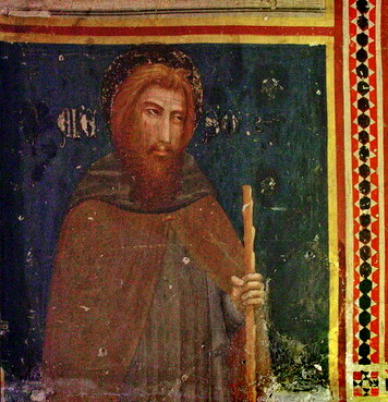 Sant Aleix (Detall)